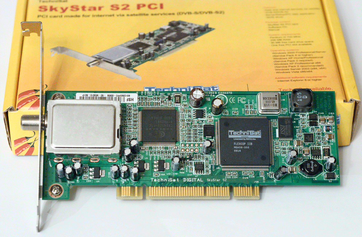 PCI-приемник DVB-S/S2